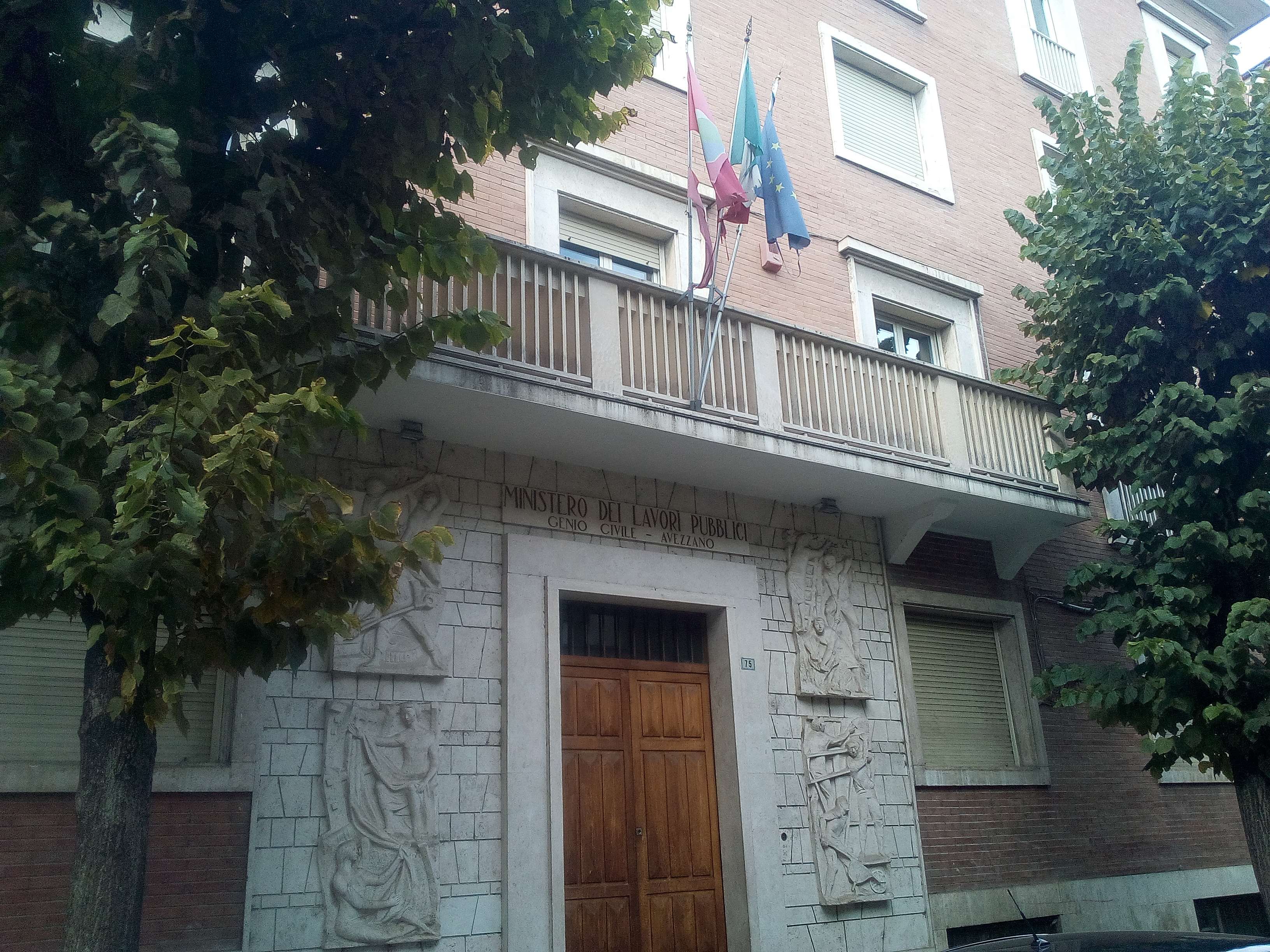 Sede del Genio civile di Avezzano